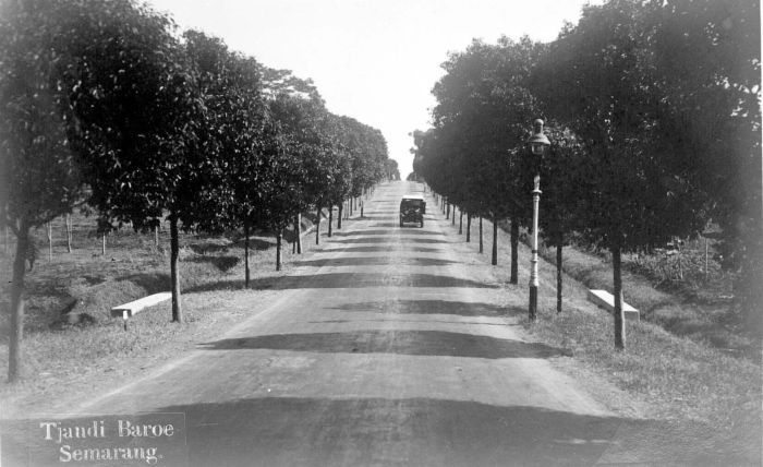 Repronegatief. De Oei Tiong Bhingweg beplant met Tandjongbomen